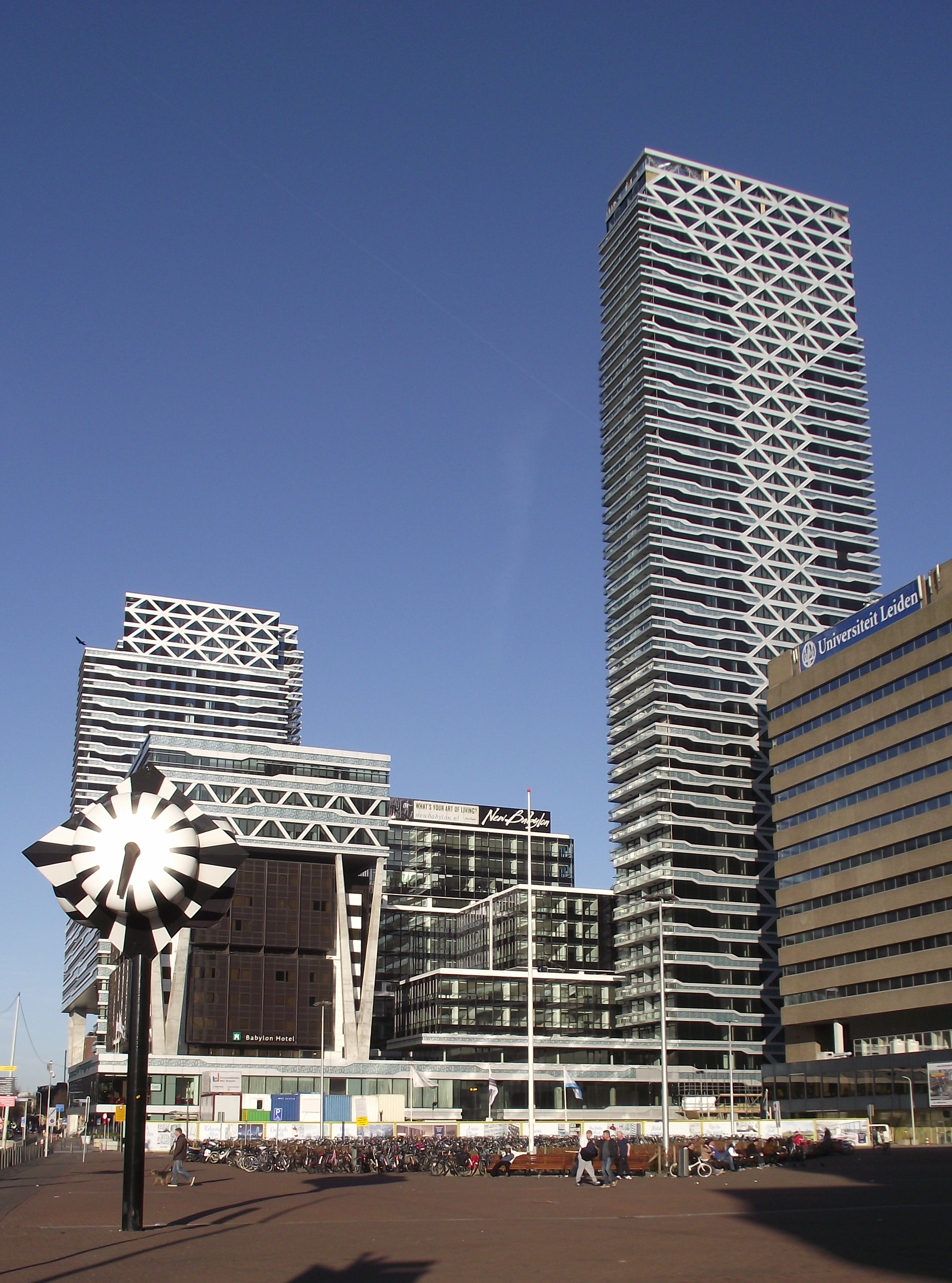 Winkelcentrum Nieuw Babylon op het Koningin Julianaplein in Den Haag, met de teruggeplaatste 'zebraklok'